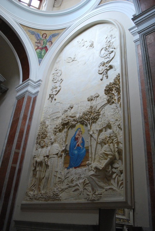 Basilica di Santa Maria Assunta ad Alcamo - Interni